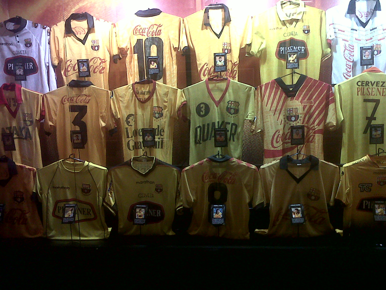 Barcelona Sporting Club - varias camisetas